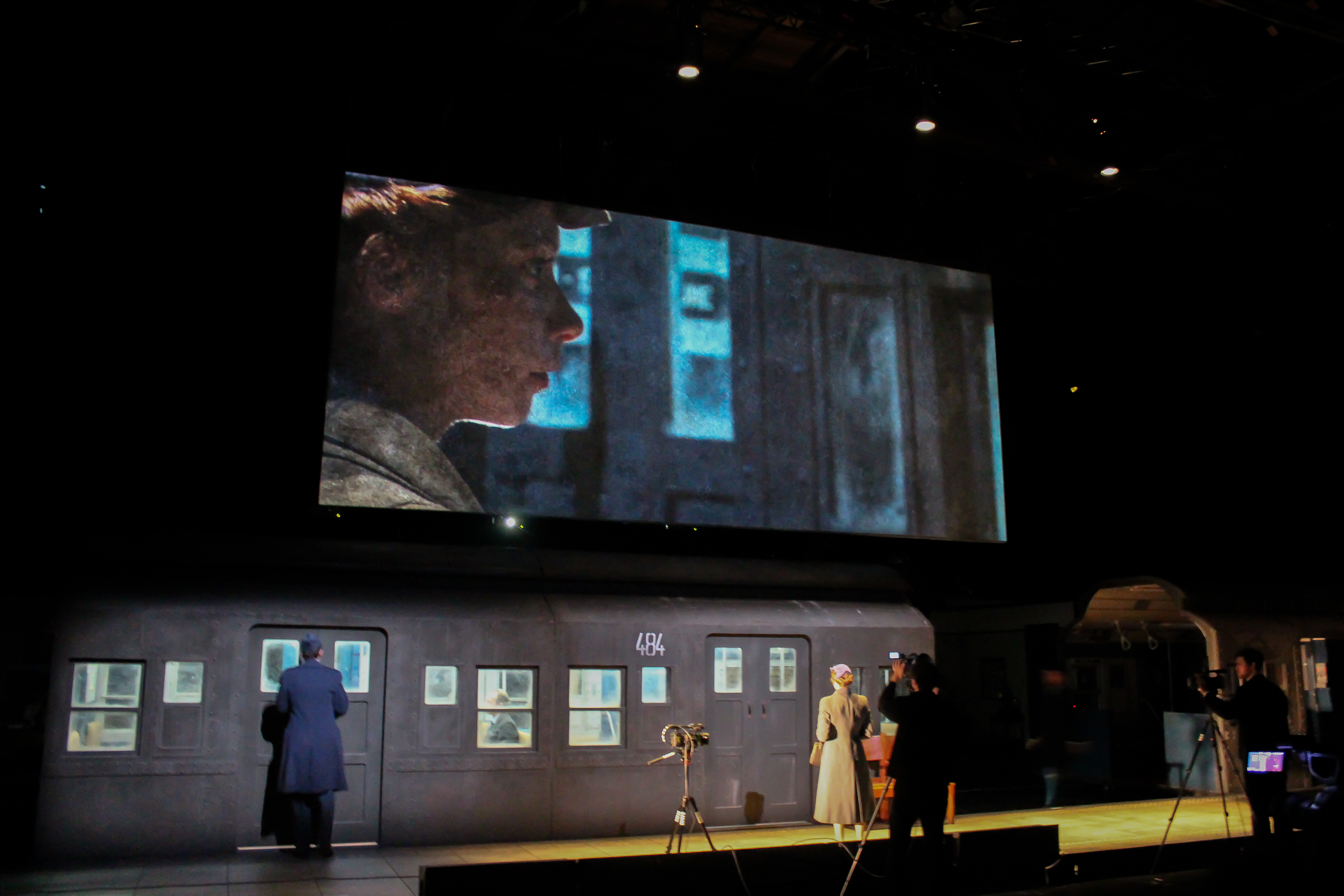 Sebastian Pircher, Jenny König, Andreas Hartmann, Stefan Kessissoglou